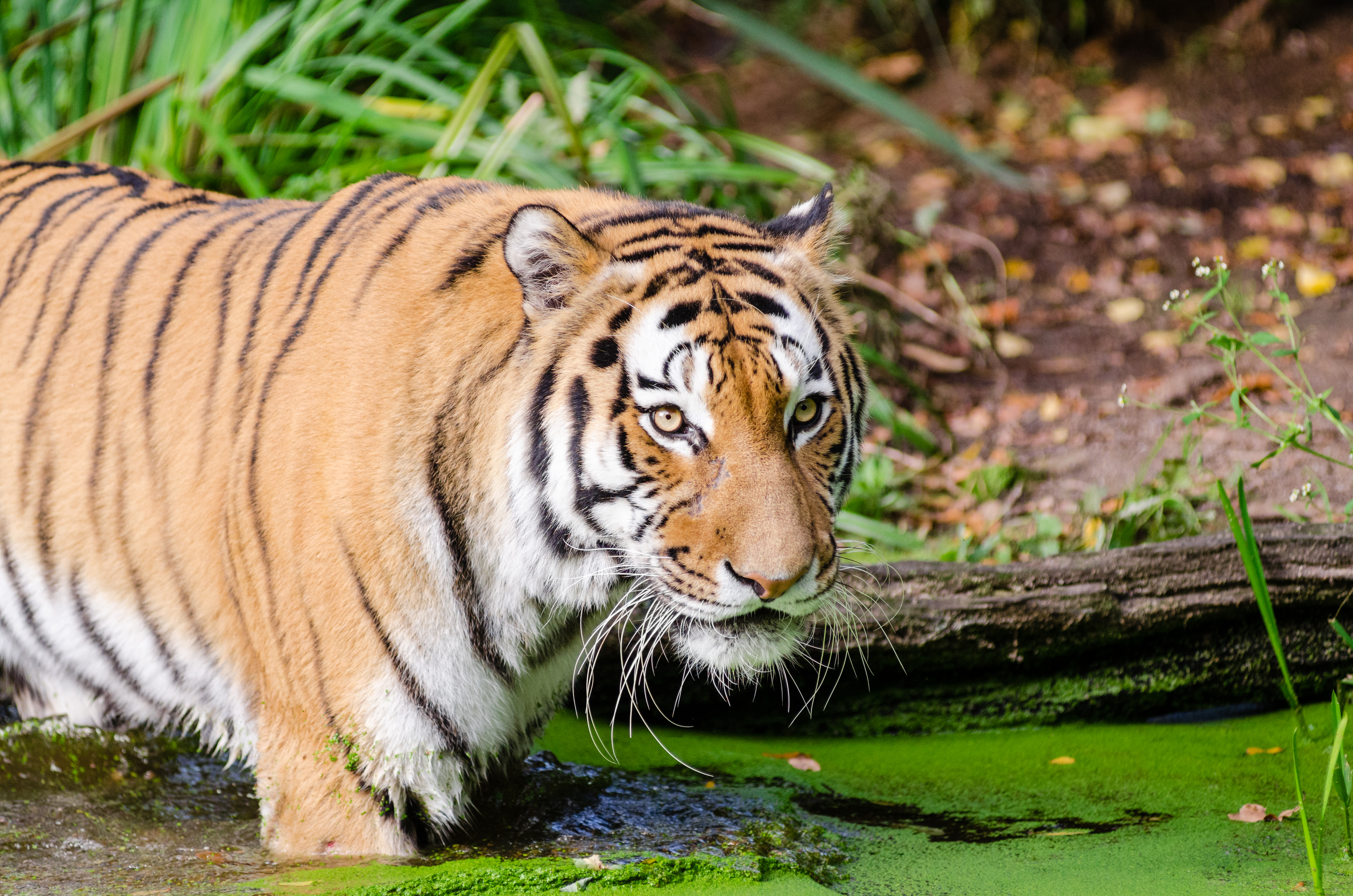 Tiger